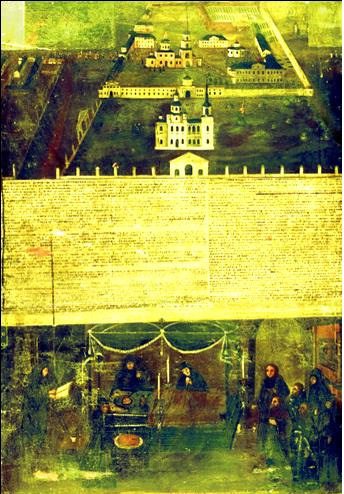 Икона-эпитафия "Прощание сестер обители с игуменией Таисией и вид Ново-Тихвинского монастыря". Создана в начале XIX века. Автор неизвестен